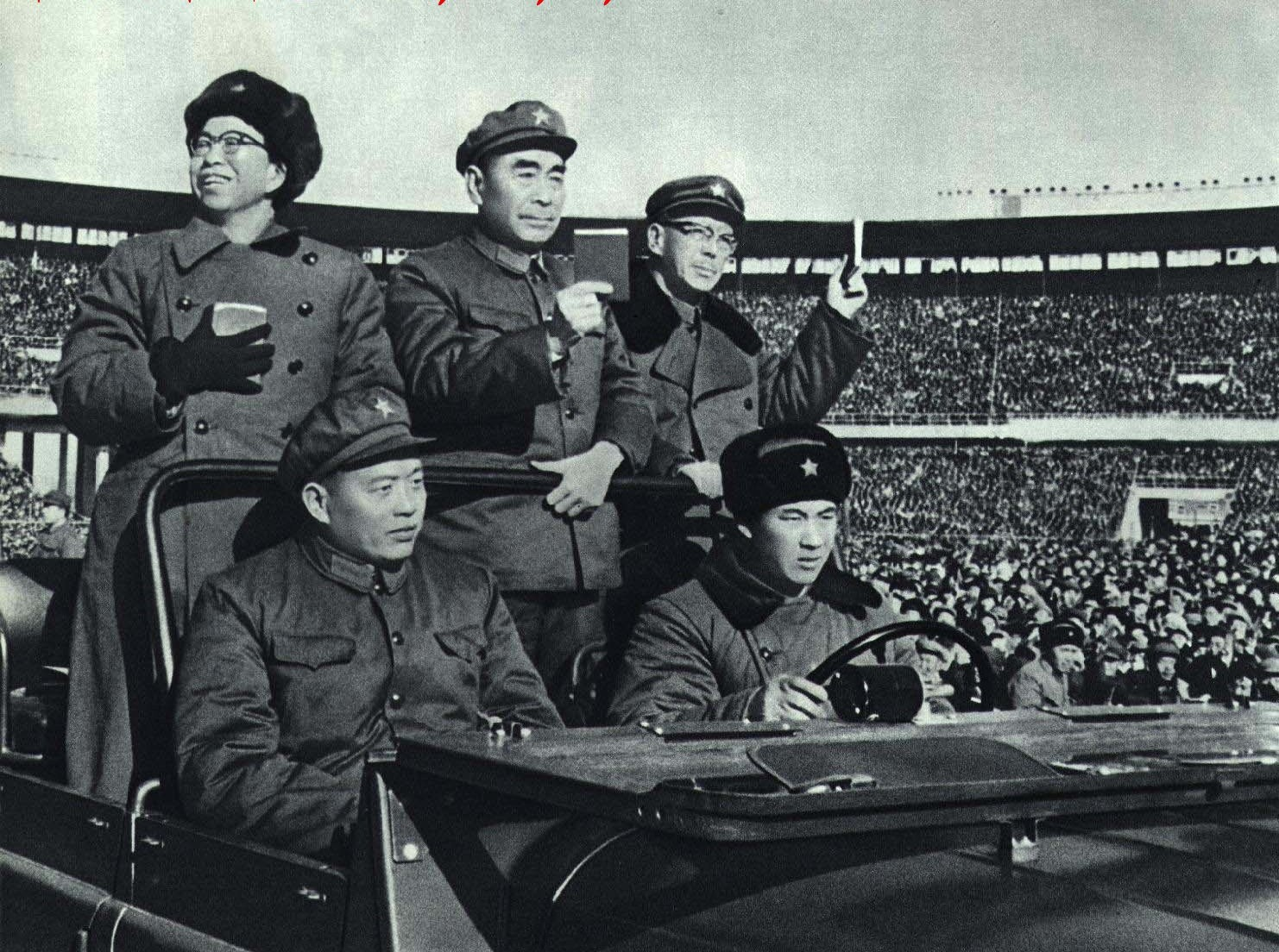 1967-03 1966年12月26日江青周恩来康生接见红卫兵